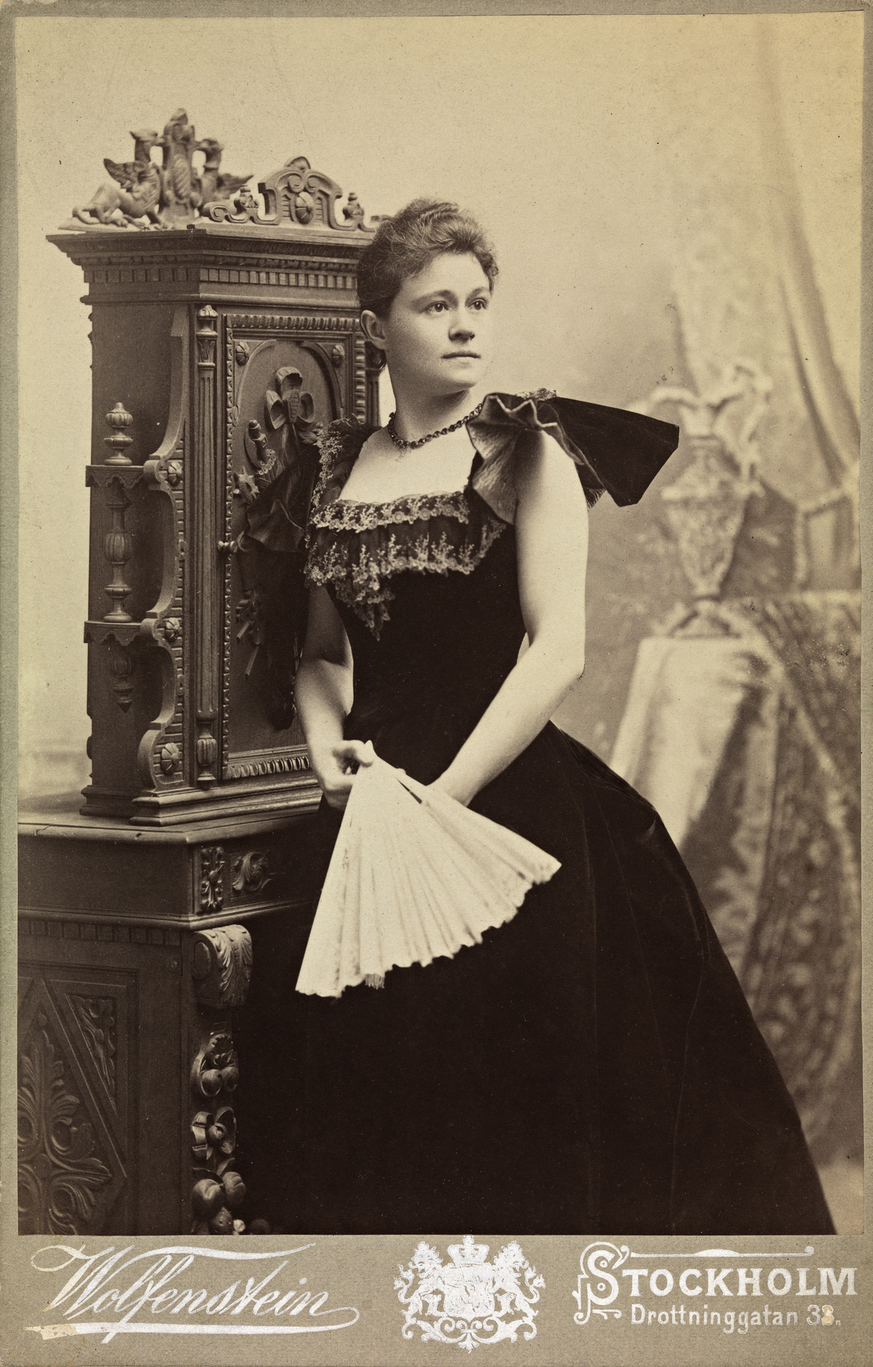 Ева Нансен (1858 - 1907) в концертном платье